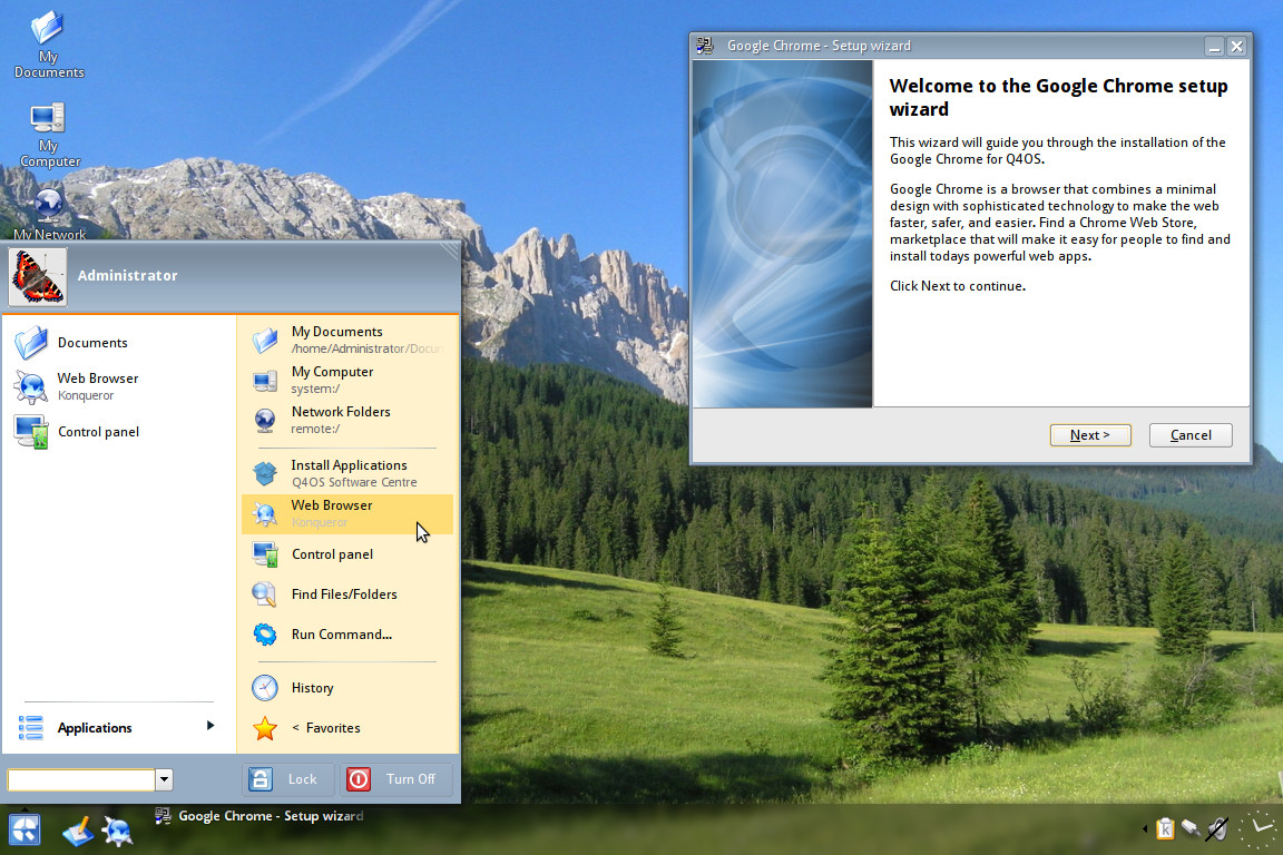 Vista - Interfaz del Escritorio de Q4OS